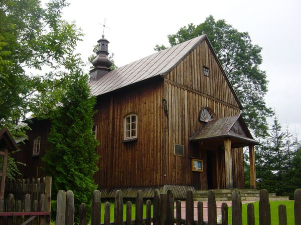 Cerkiew Michała Archanioła w Brzegach Dolnych